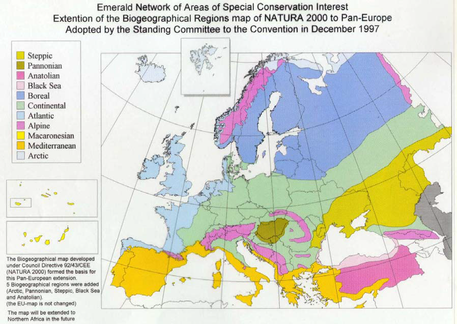 Схема біогеографічного поділу Європи станом на 1997 рік